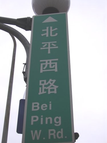 臺北市中正區北平西路路名標誌。